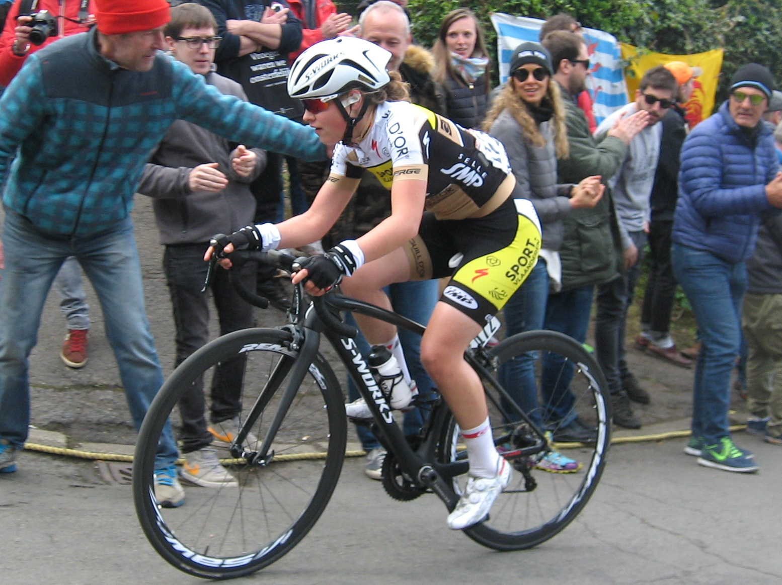 Fien Delbaere (Sport Vlaanderen) in de Waalse Pijl 2017